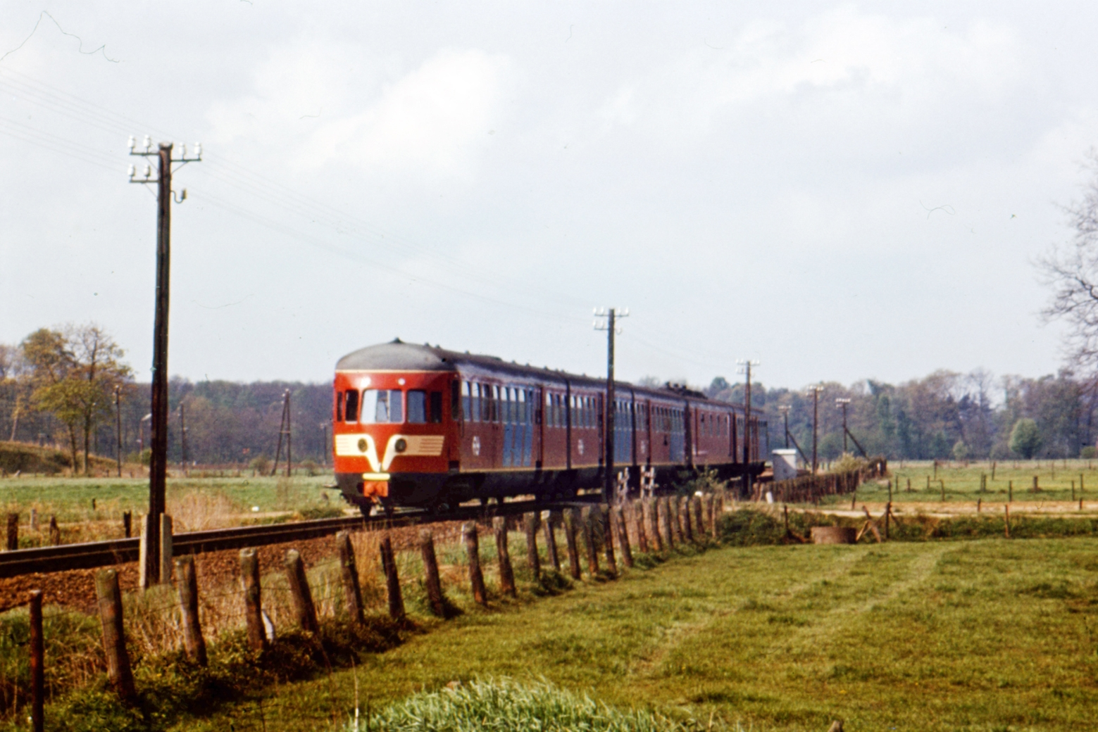 De Dieselvijf (DE5) kwam langzaam op gang, dit kwam de reistijd tussen Arnhem en Winterswijk niet ten goede. Gelukkig waren er toen geen kwartiersdiensten. Zelfs een halfuursdienst was alleen voor de spits weggelegd. Dank aan A Ligtenbarg